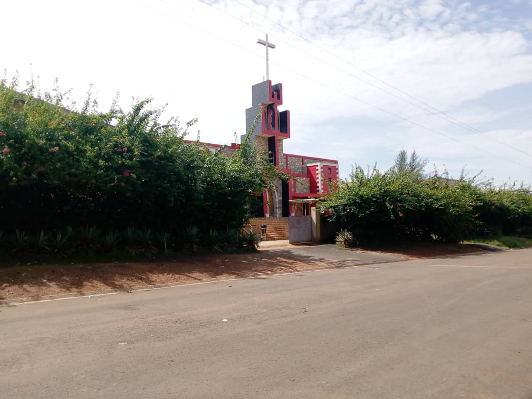 Bâtiment de l'église